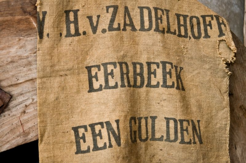 Eerbeekse Oliemolen originele meelzak